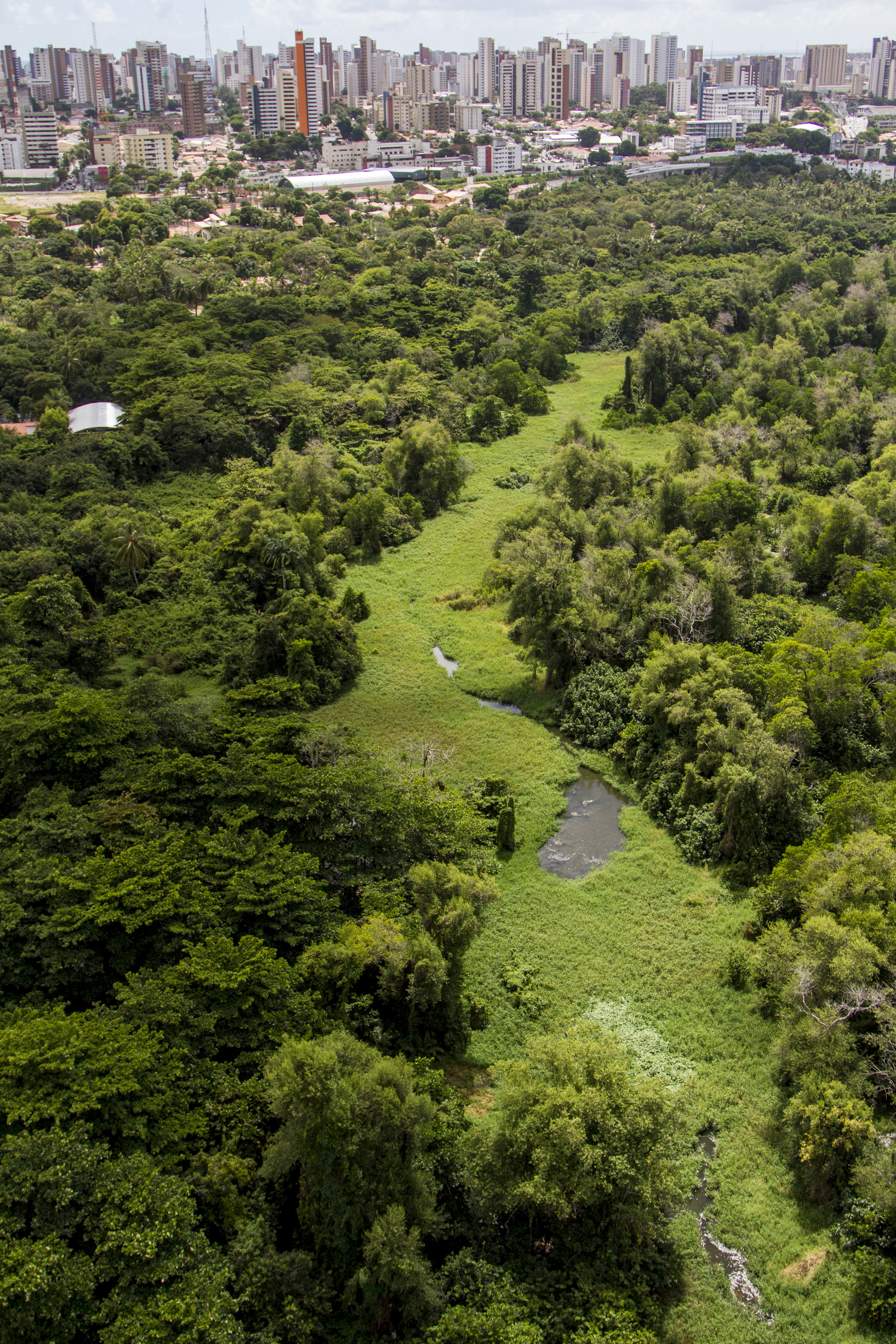 Parque Ecológico do Cocó (Cocó Ecological Park)